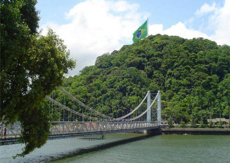 Imagem de São Vicente. A ponte e a Bandeira: Ponte Pensil em São Vicente/SP/Brasil License on Flickr (2011-02-09): CC-BY-2.0 Flickr tags: Ponte, mar, bandeira, mata, água, Frente a Frente